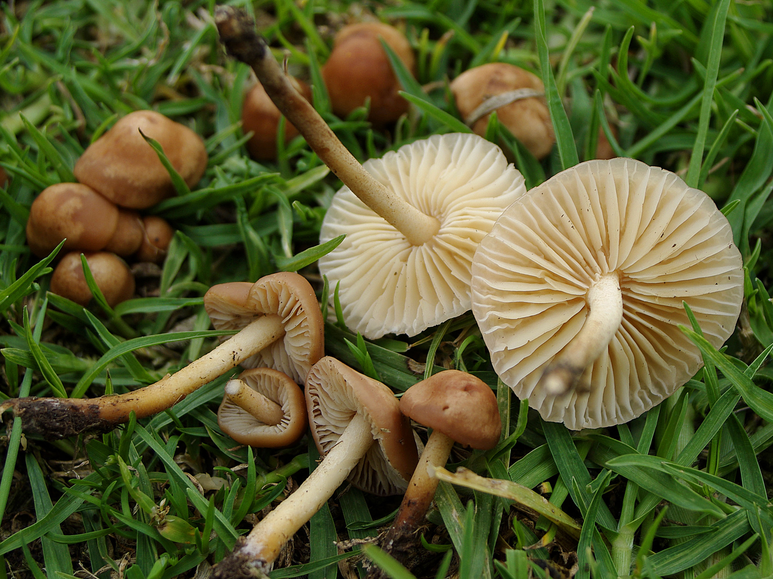 Marasmius oreades (Bolton) Fr.